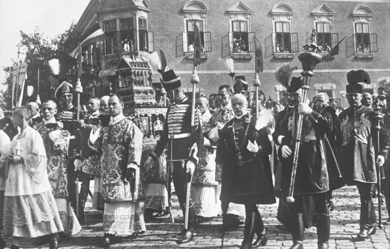 Der grosse St. Stephanstag in Budapest! Die grösste Nationalfeier Ungarns zu Ehren St. Stephans, des ersten Königs von Ungarn, wurde in Budapest unter Beteiligung des Reichsverwesers Horty, der Kirchen, weltlichen und militärischen Behörden festlich begangen. In grosser Prozession wird die Stephans-Reliquie, die Hand Stephans, in einem goldenne Schrain durch die Strassen Budapests getragen.